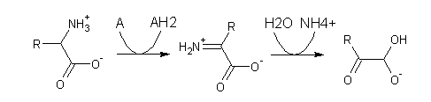 Reacció oxidativa (fórmula química)